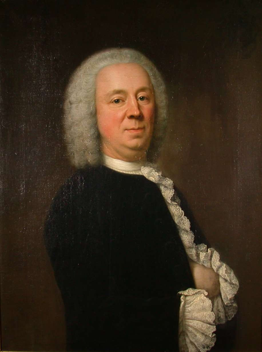 Portret van Jacob van Cittters